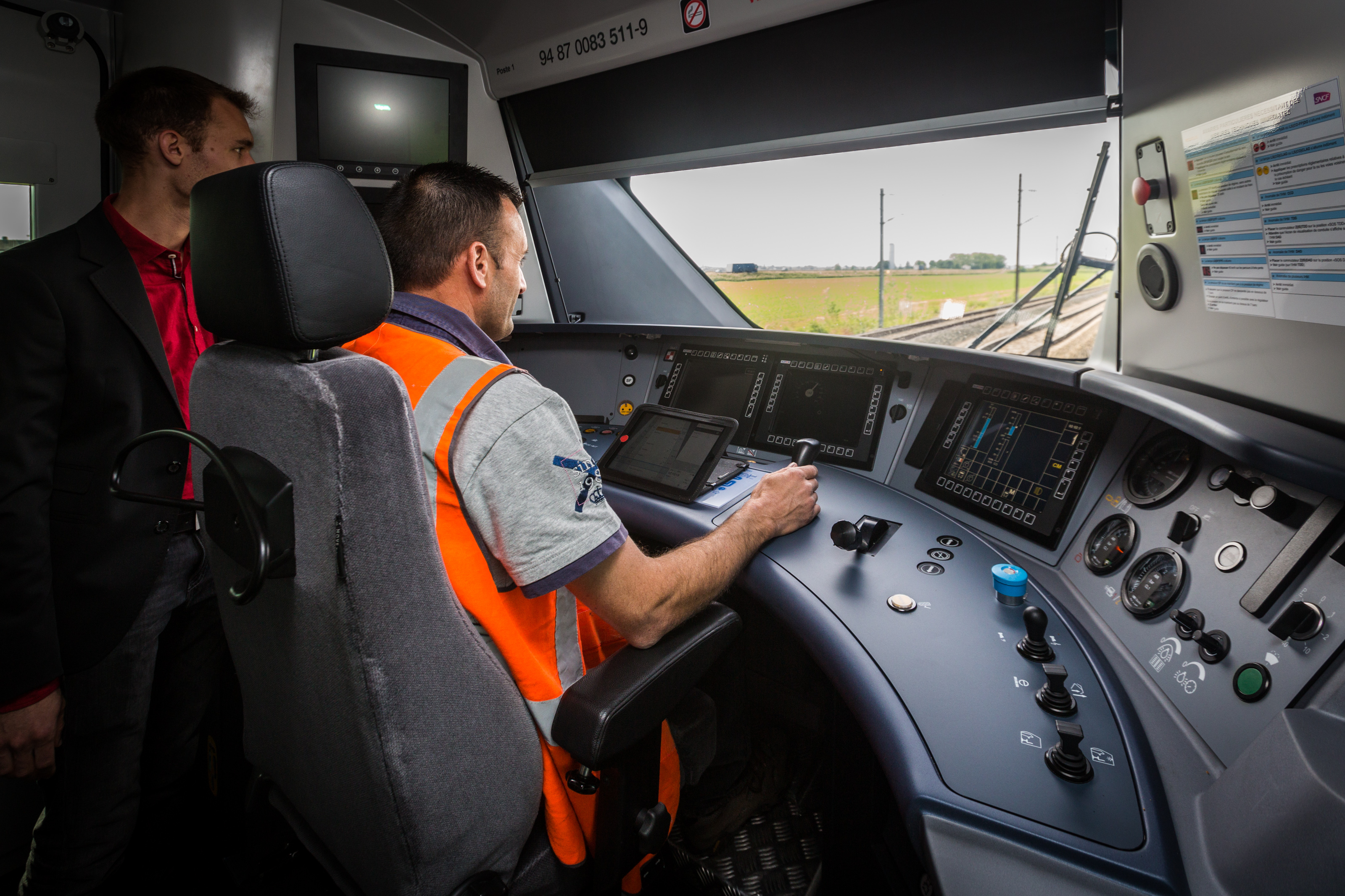 Régiolis 83511 TER Alsace 28 mai 2015